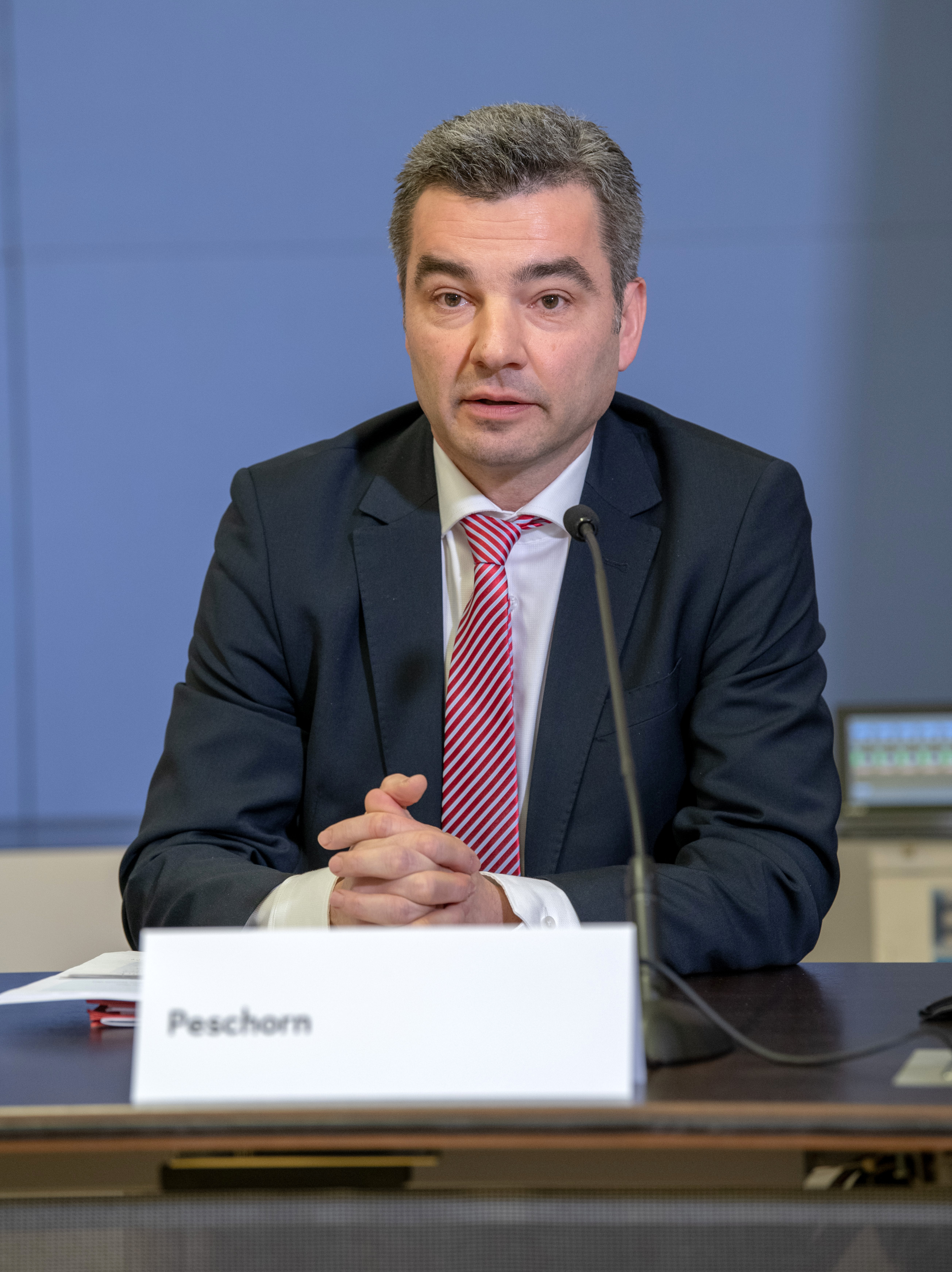 Wolfgang Peschorn, bei Löger präsentiert Anti-Steuerbetrugspaket